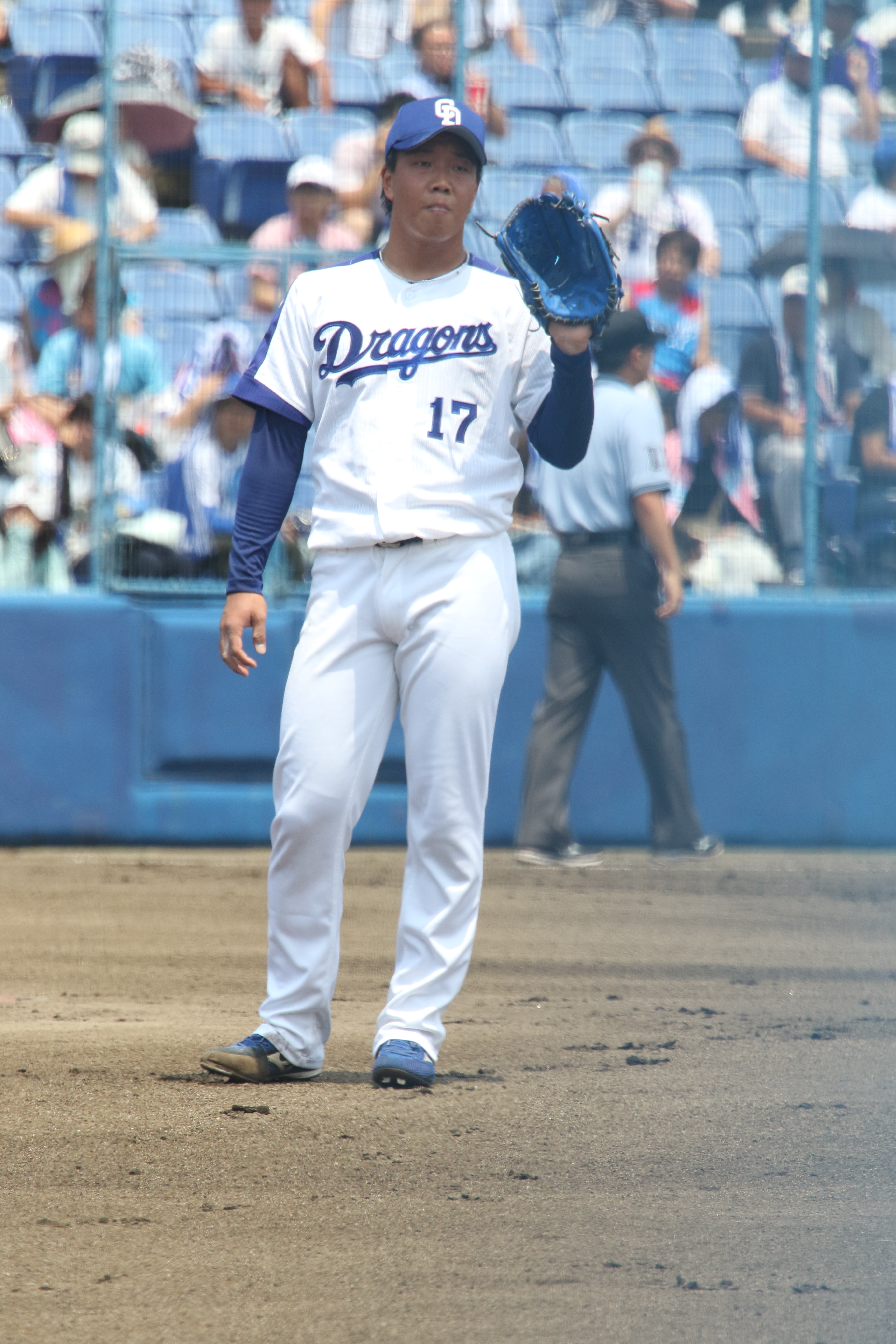 2018年7月21日、ナゴヤ球場にて